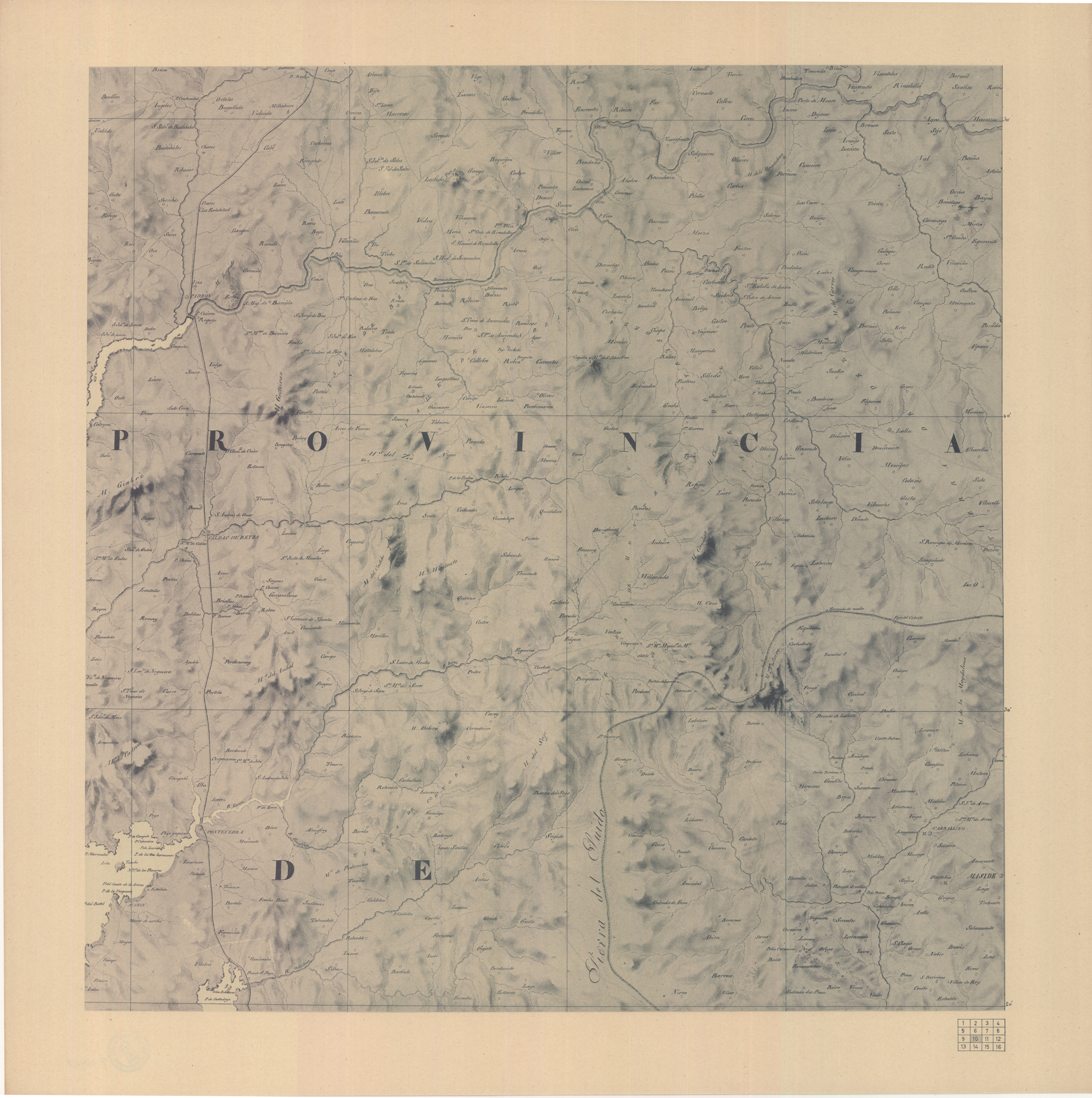 CARTA GEOMETRICA D E Galicia Dividida en sus Provincias de Coruña, Lugo, Orense, Pontevedra, y subdividida en Partidos judiciales ó Alcaldias mayores; PRESENTADA À S.M. LA AUGUSTA REINA GOVERNADORA Doña Maria Cristina de Borbon Por mano de su Secretario de Estado y del Despacho de lo Interior EL EXCMO. S. D. JOSE MARIA MOSCOSO DE ALTAMIRA Levantada y construida en la escala de cienmilesimo POR EL DOCTOR D. DOMINGO FONTAN, Catedràtico de Matemàticas Sublimes en la Real Universidad de Santiago, y de Mecanica industrial por el Real Conservatorio de Artes, Socio correspondiente dela Real Academia de la Historia. AÑO DE 1834